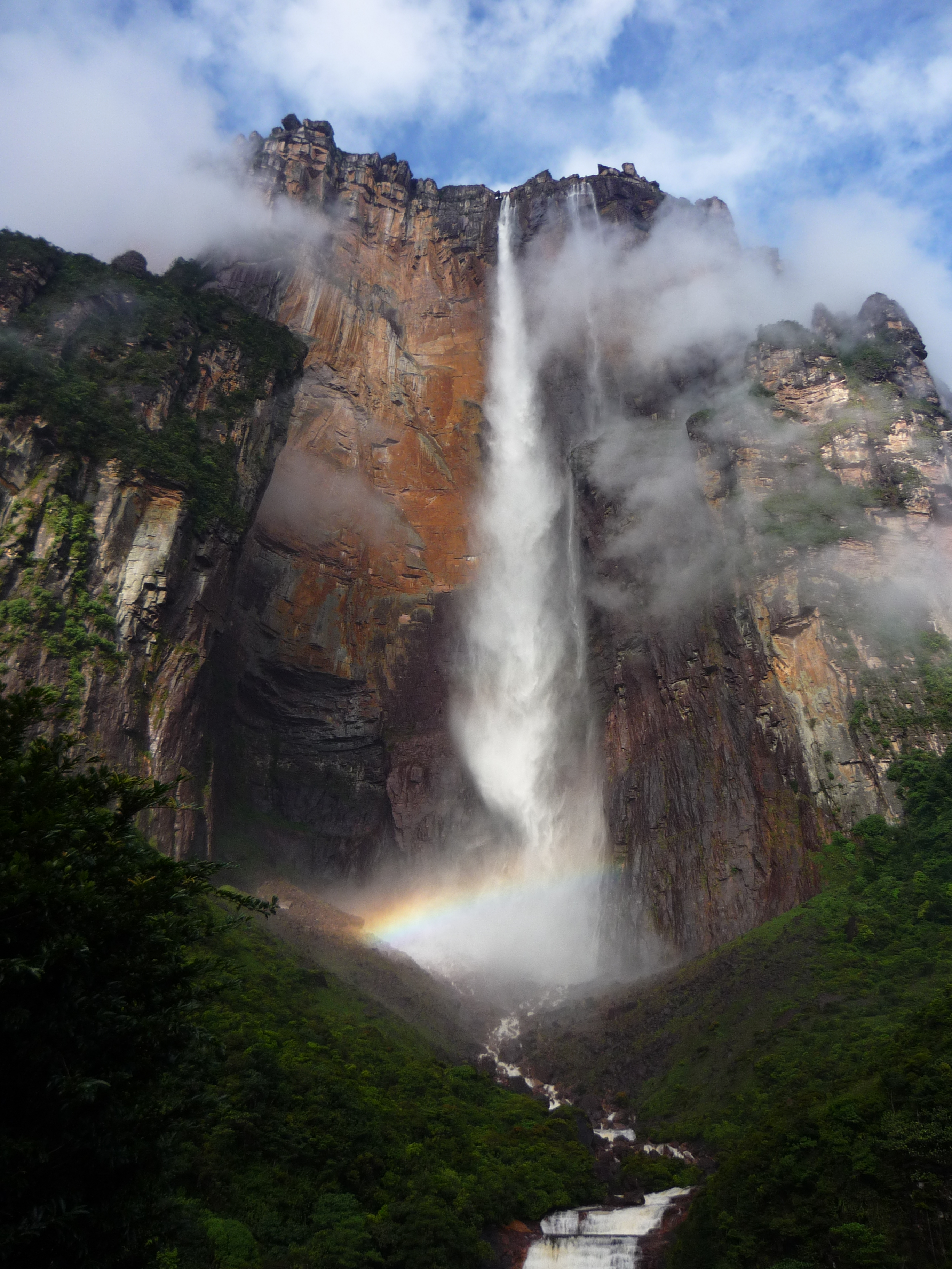 Parque Nacional Canaima (Sector Occidental)